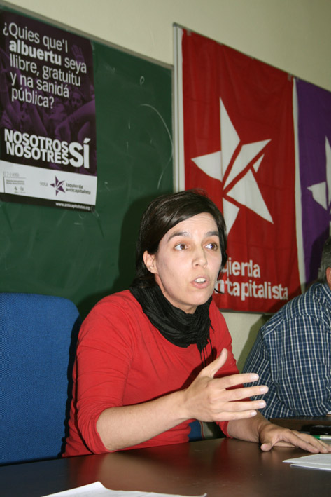 Acto presentación candidatura anticapitalista en Oviedo. Esther Vivas. 28/05/09.